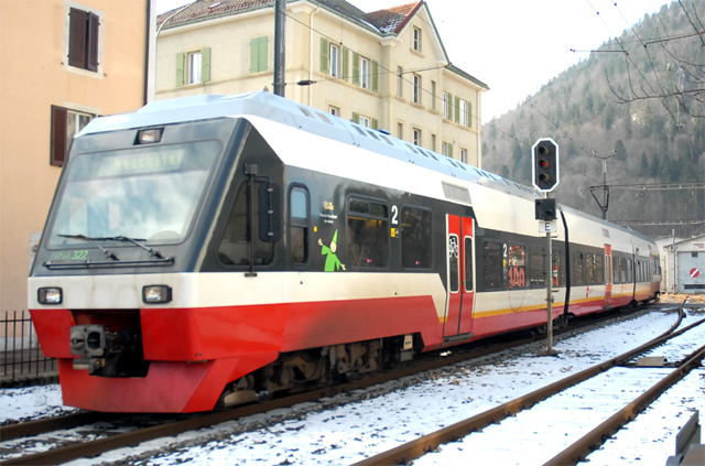 Transports Régionaux Neuchâtelois (TRN) treinstel RABe 527 322 van het type Nina te Fleurier. Tegenwoordig bij BLS als RABe 525 038 ingebruik.